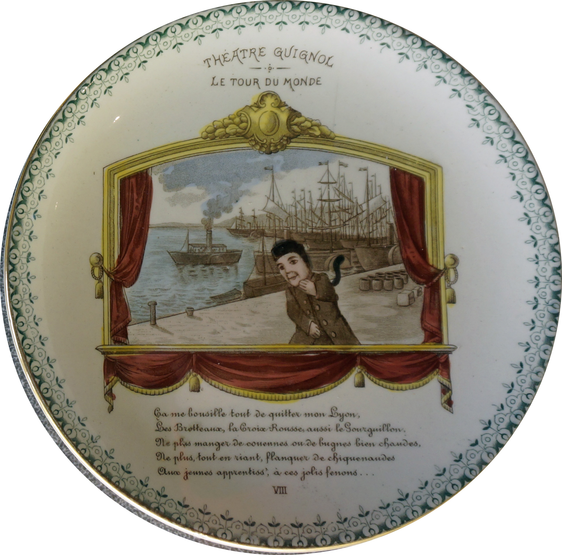 Assiette_Guignol N°VIII, fabrication de Choisy.